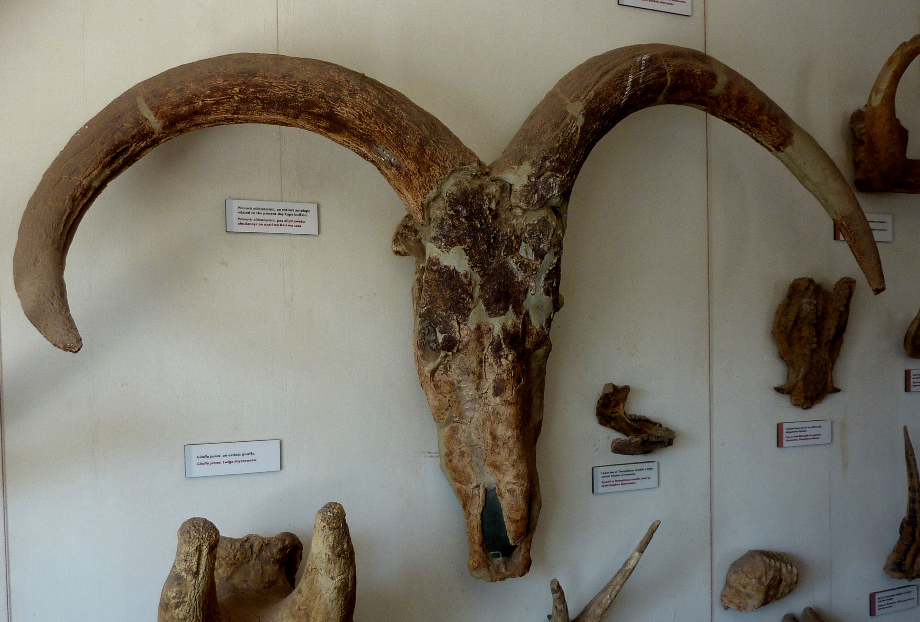 Pelorovis oldowayensis